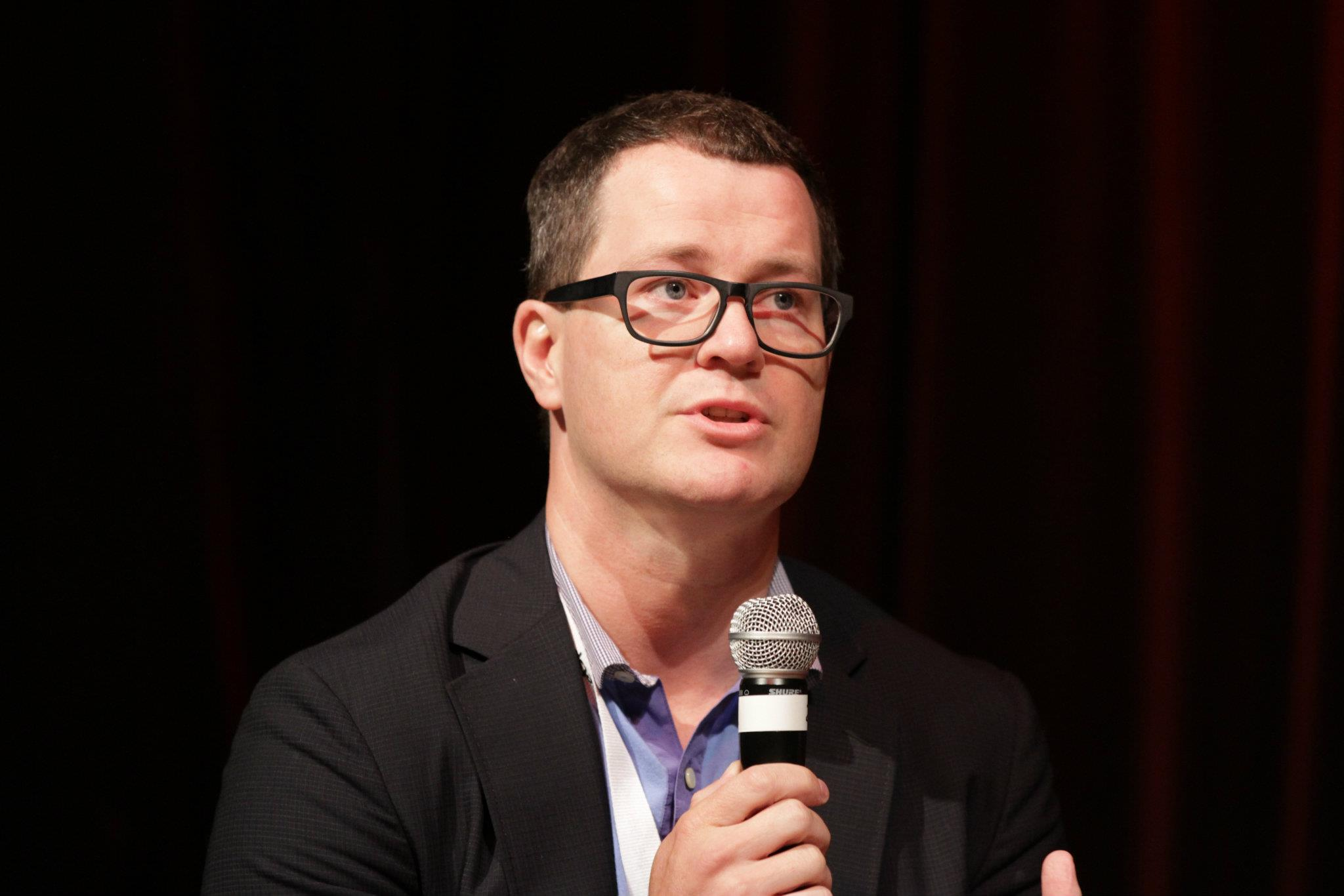 Kristopher B. Jones